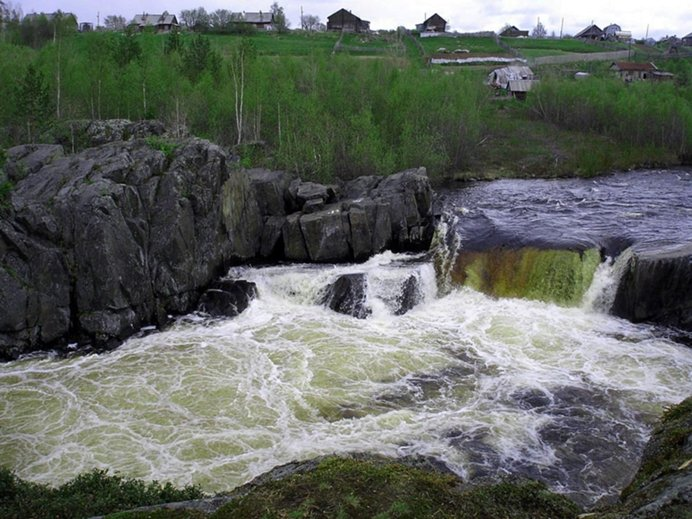 Воицкий водопад (Республика Карелия, Сегежа, деревня Надвоицы)